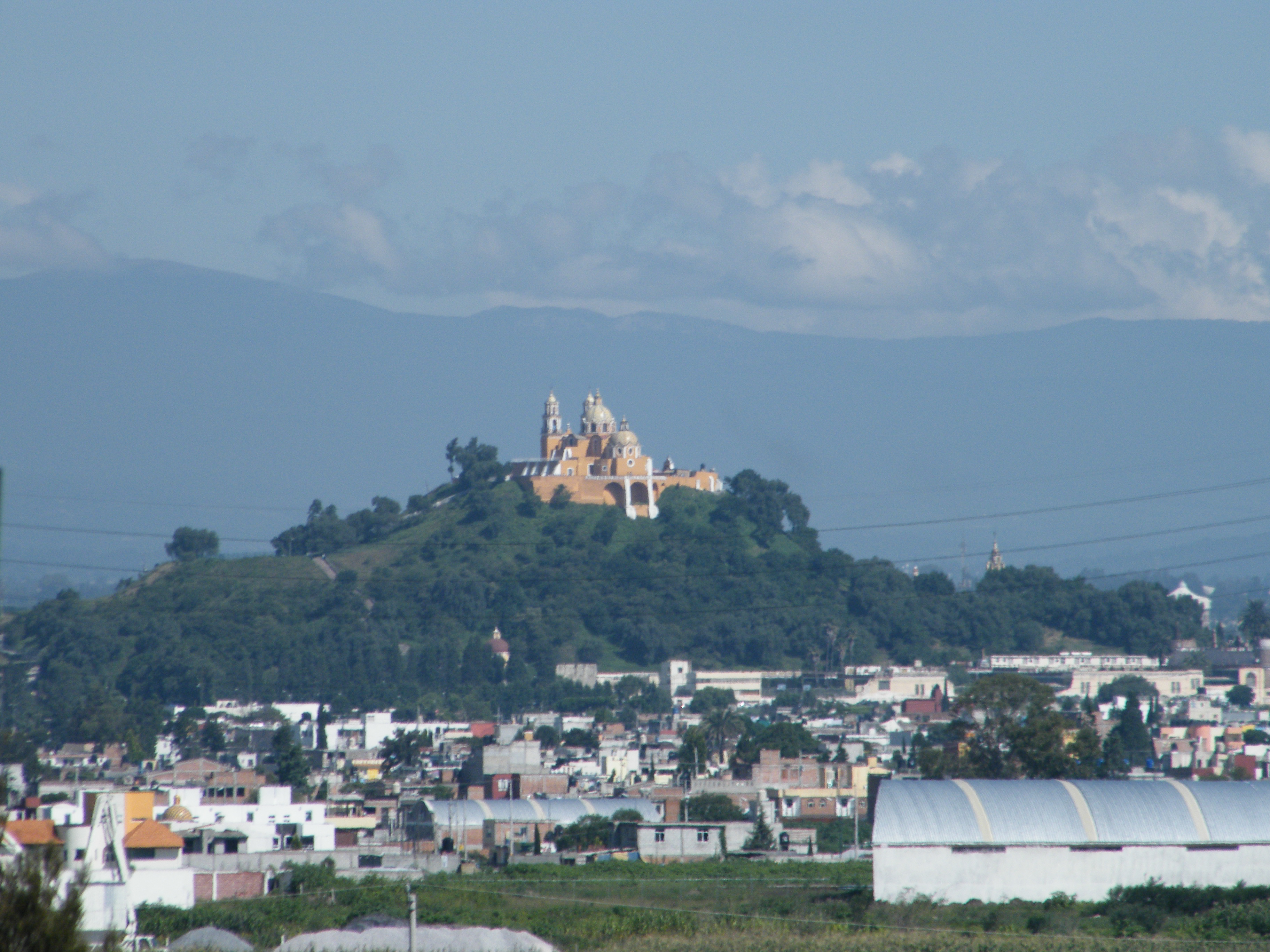 Vista de la Zona Arqueológica de Cholula, se observa la iglesia sobre la base piramidal.